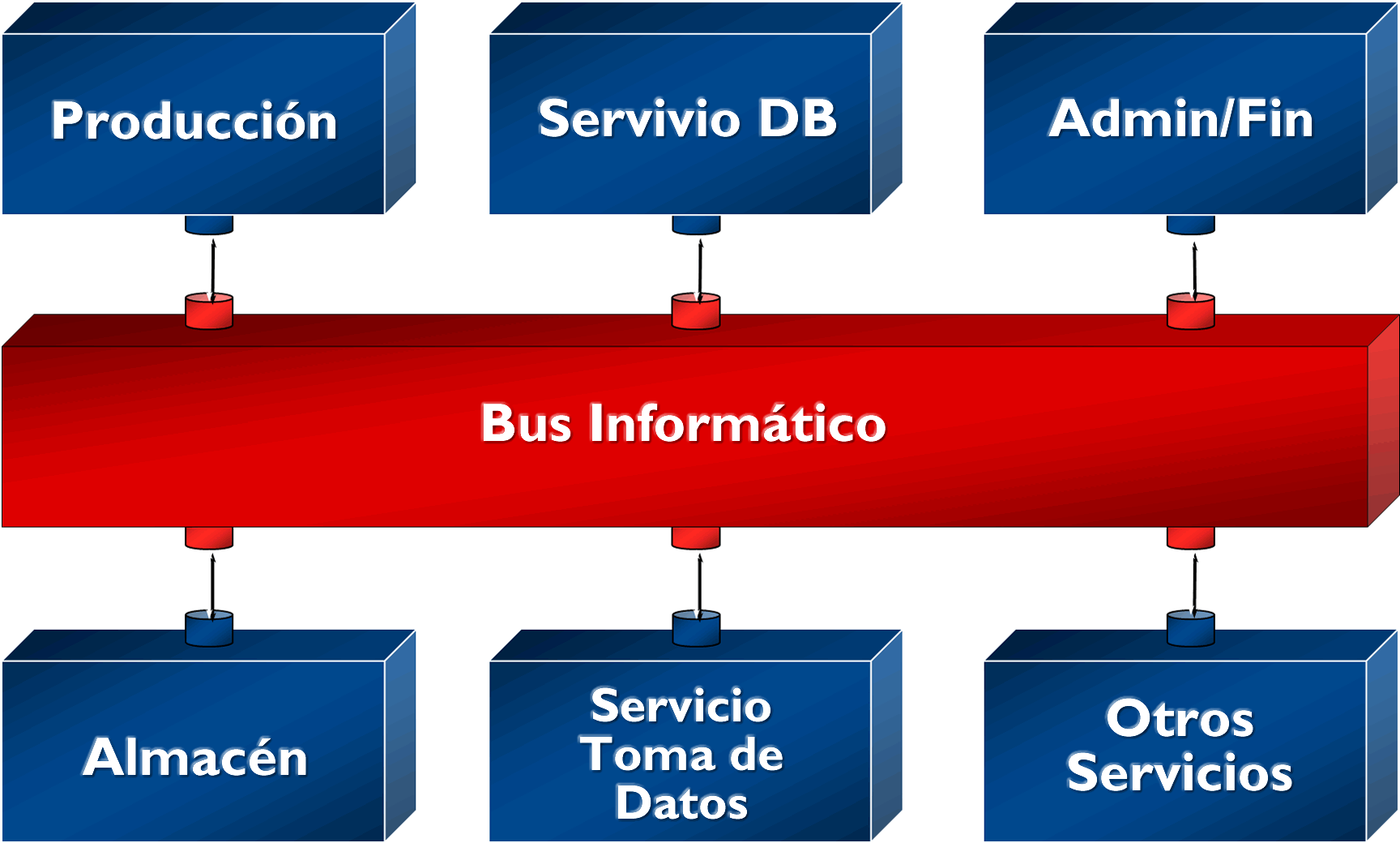 Esquema del funcionamiento de la arquitectura orientada a servicios para una sistema informático